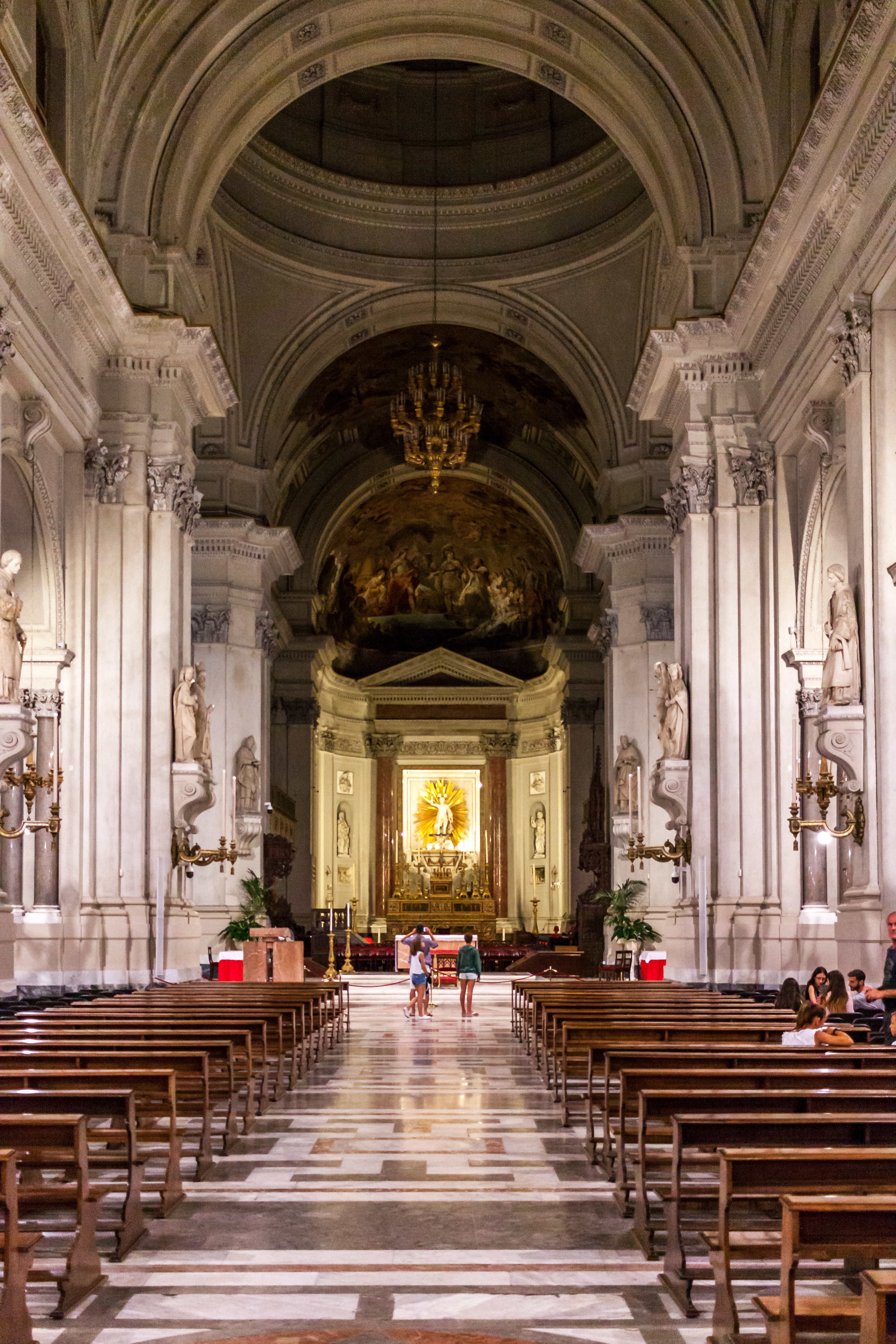 Italien, Sizilien, Palermo, Dom